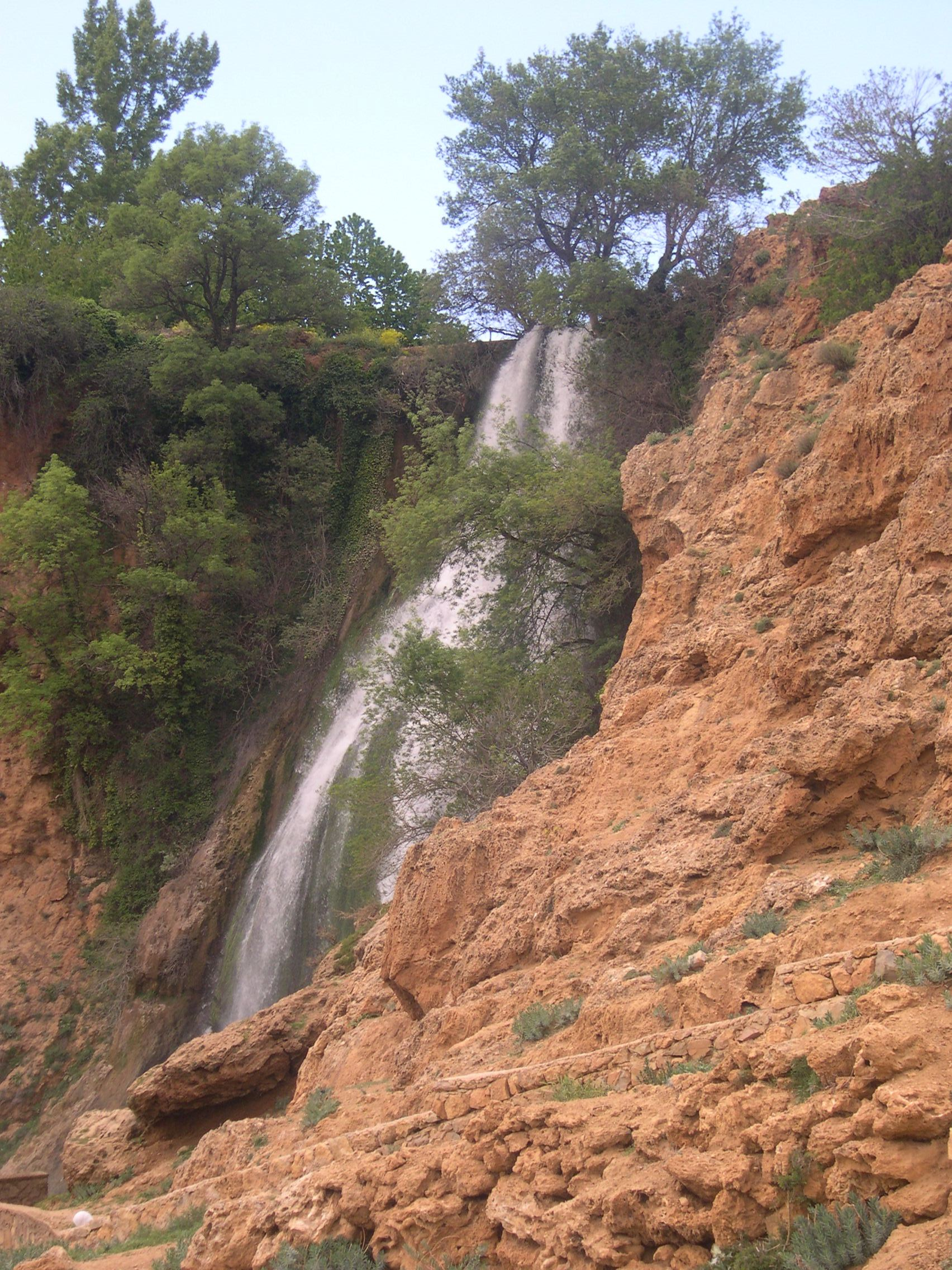 Source:Photo personnelle de Hadraj Said Droit d'auteur: Hadraj Said Photographe: Hadraj Said Photo: source de Charchoura immouzer Marmmoucha